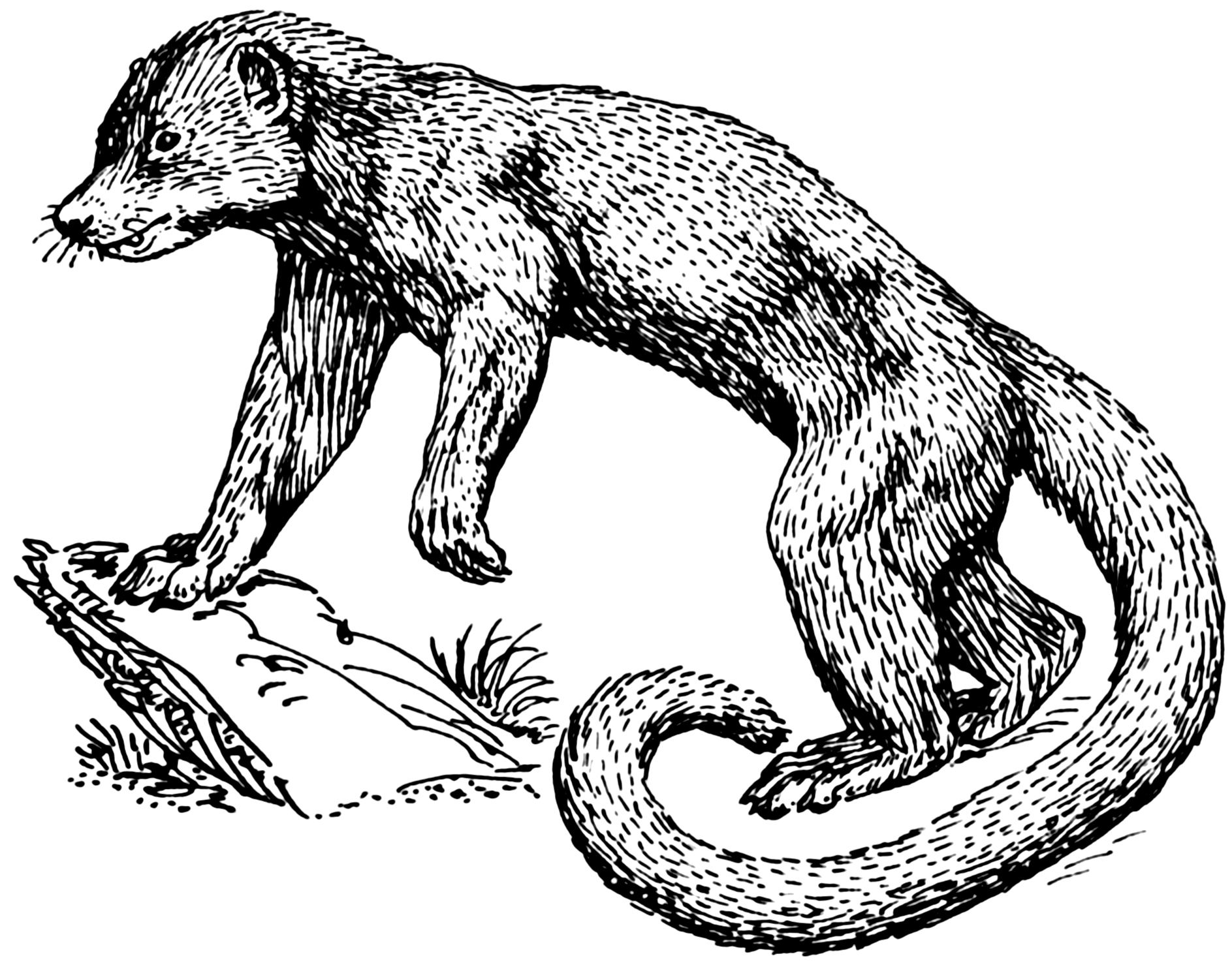 Line art drawing of kinkajou.